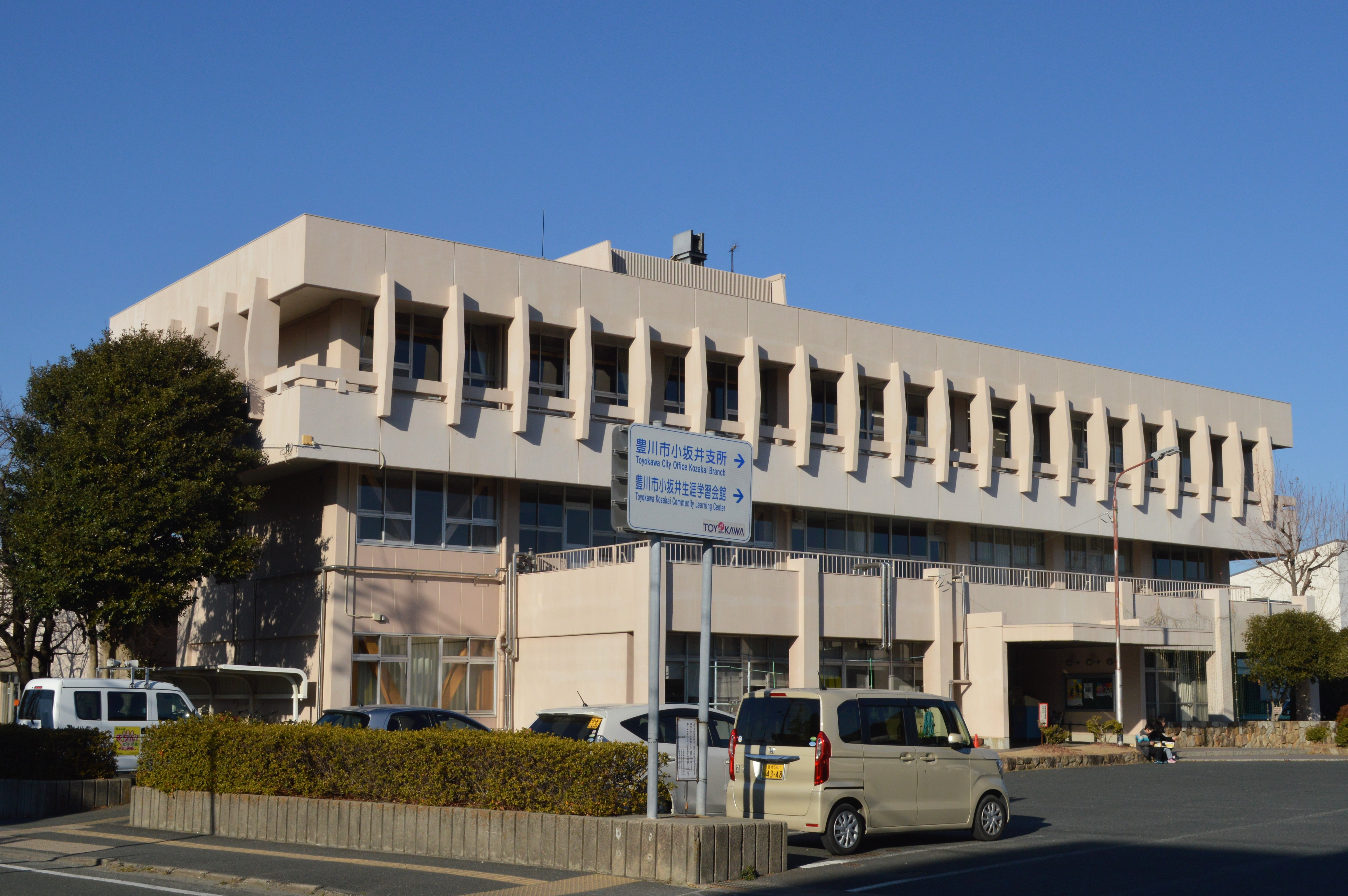 愛知県豊川市にある豊川市小坂井生涯学習会館。